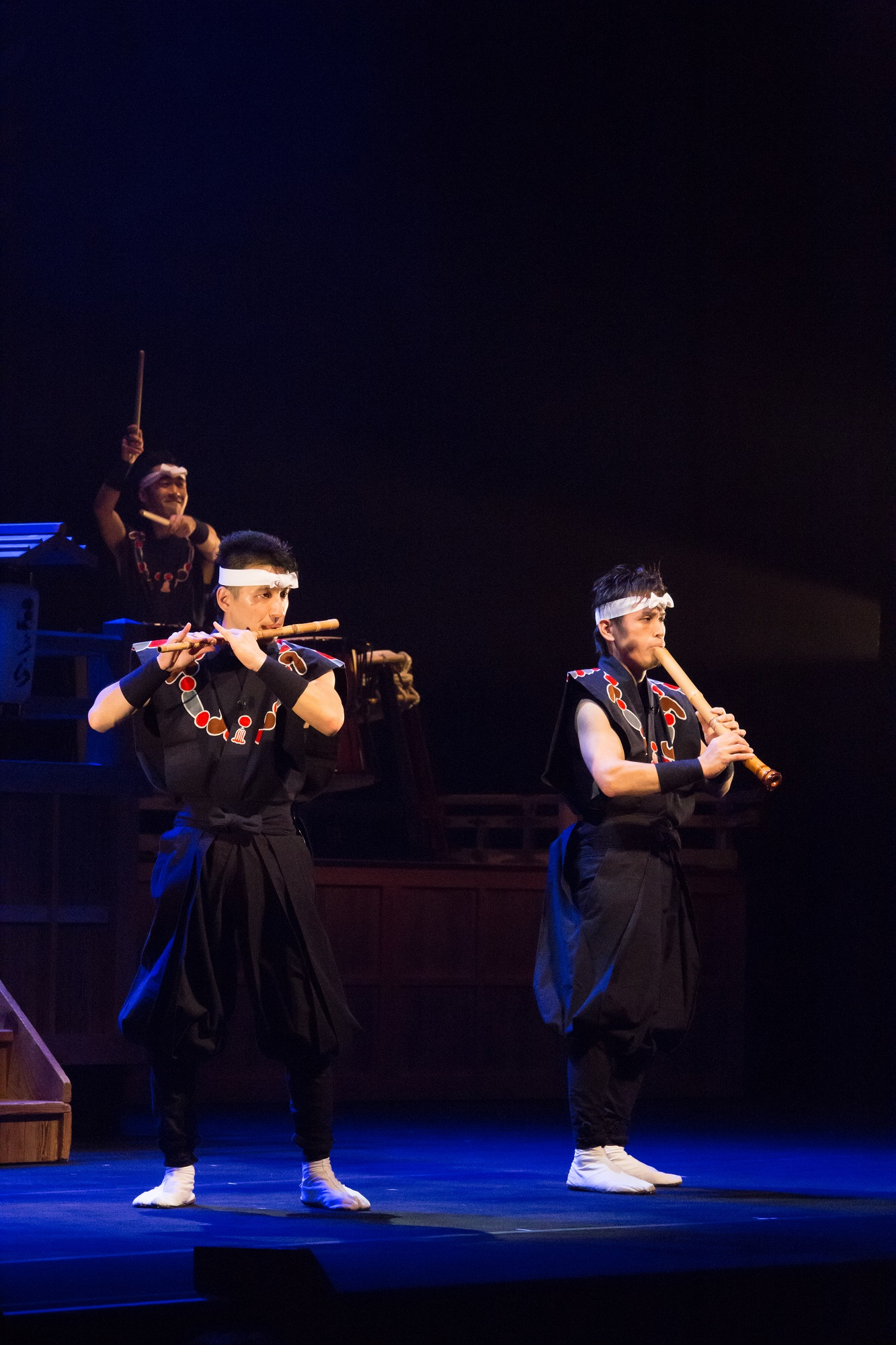 旅空